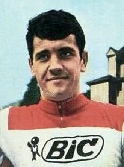 Alain Vasseur (1971), 'Sprint 71', Panini figurina n°89.